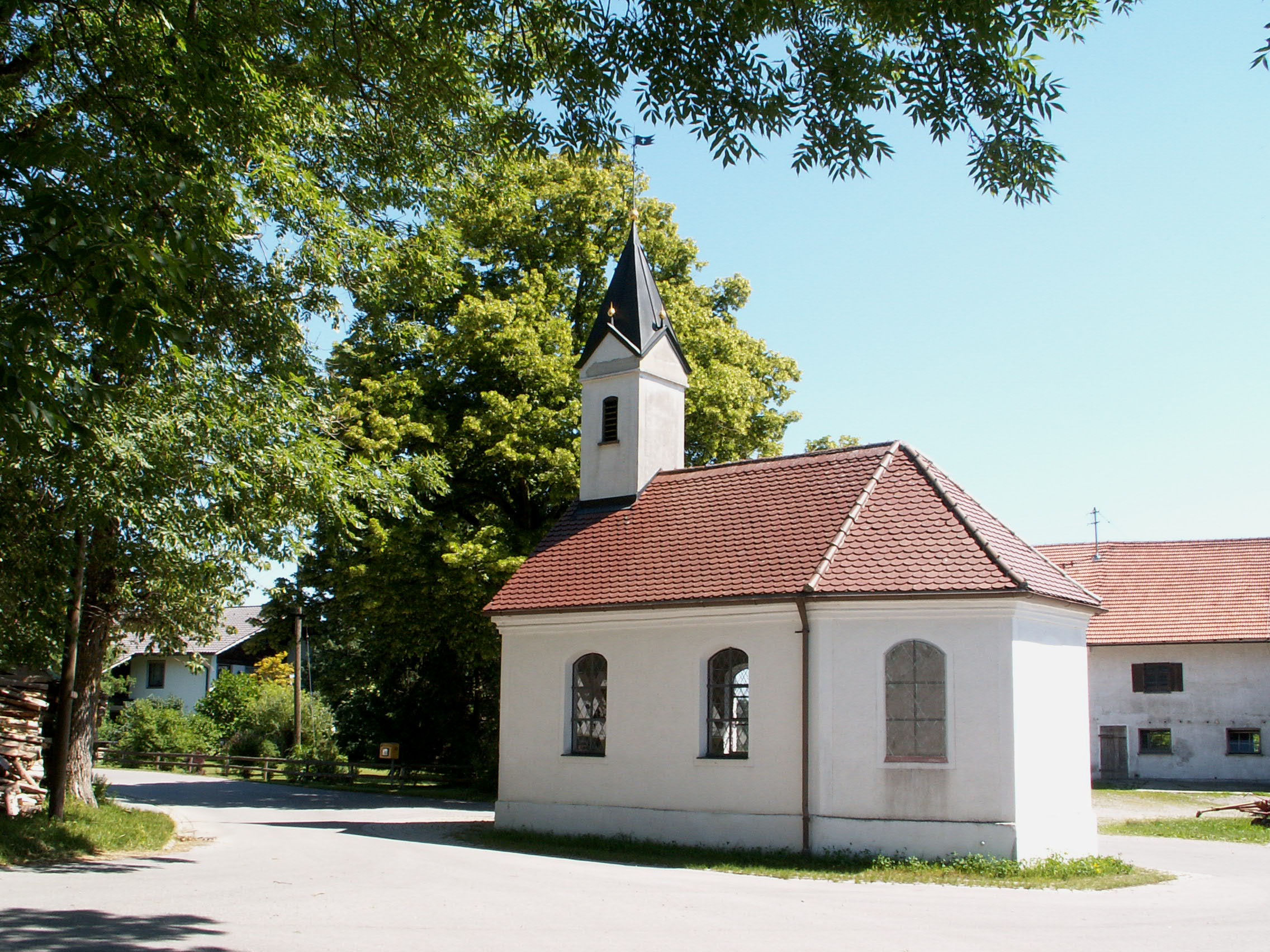 Kapelle in Krottenhill, Ingenried